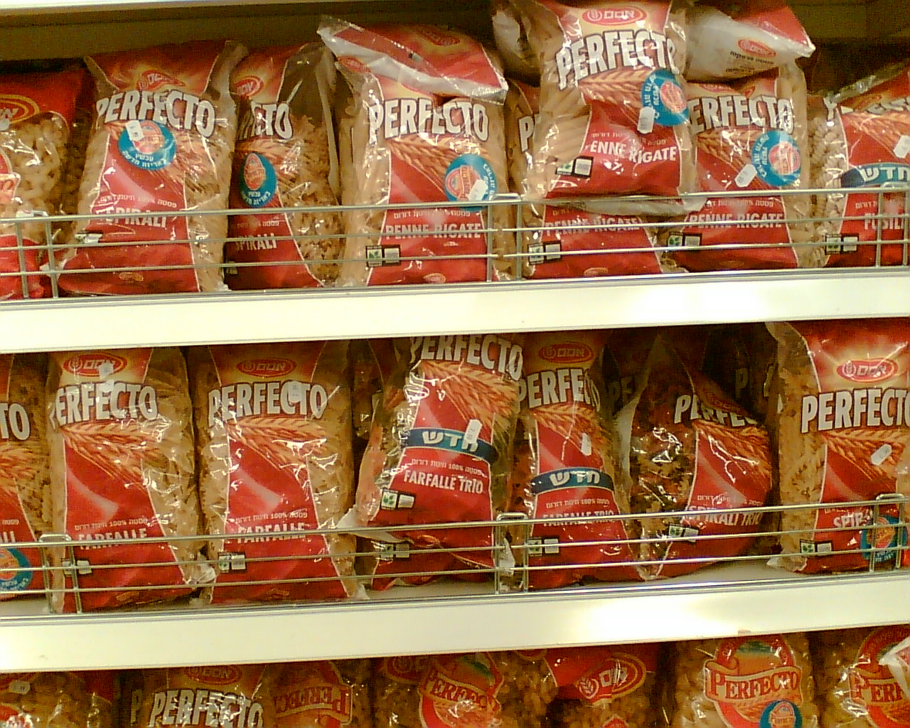 ממוצרי אסם. צילם דוד שי.